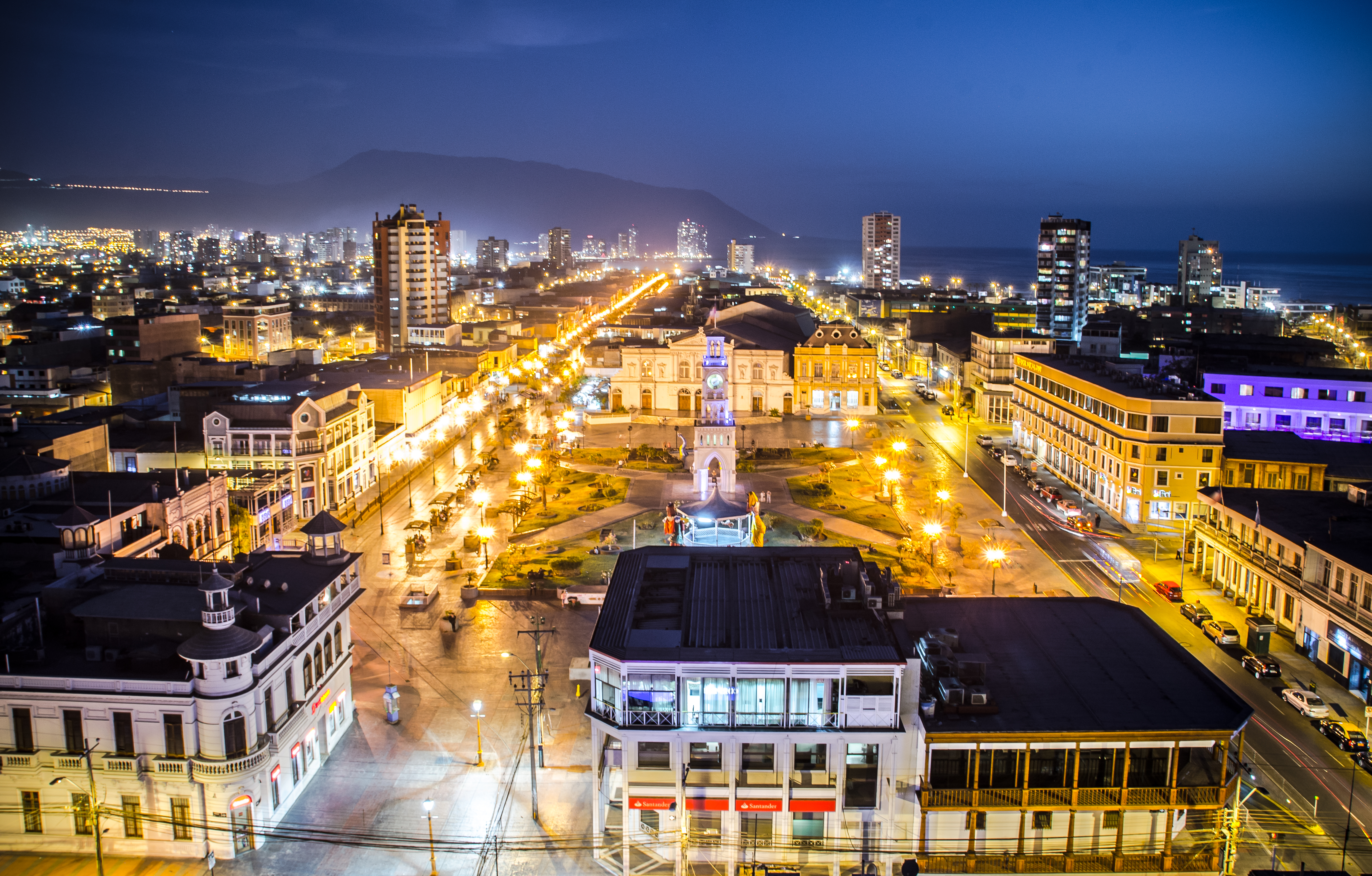 Calle Baquedano y Plaza Arturo Prat This is a photo of a national monument in Chile: 527